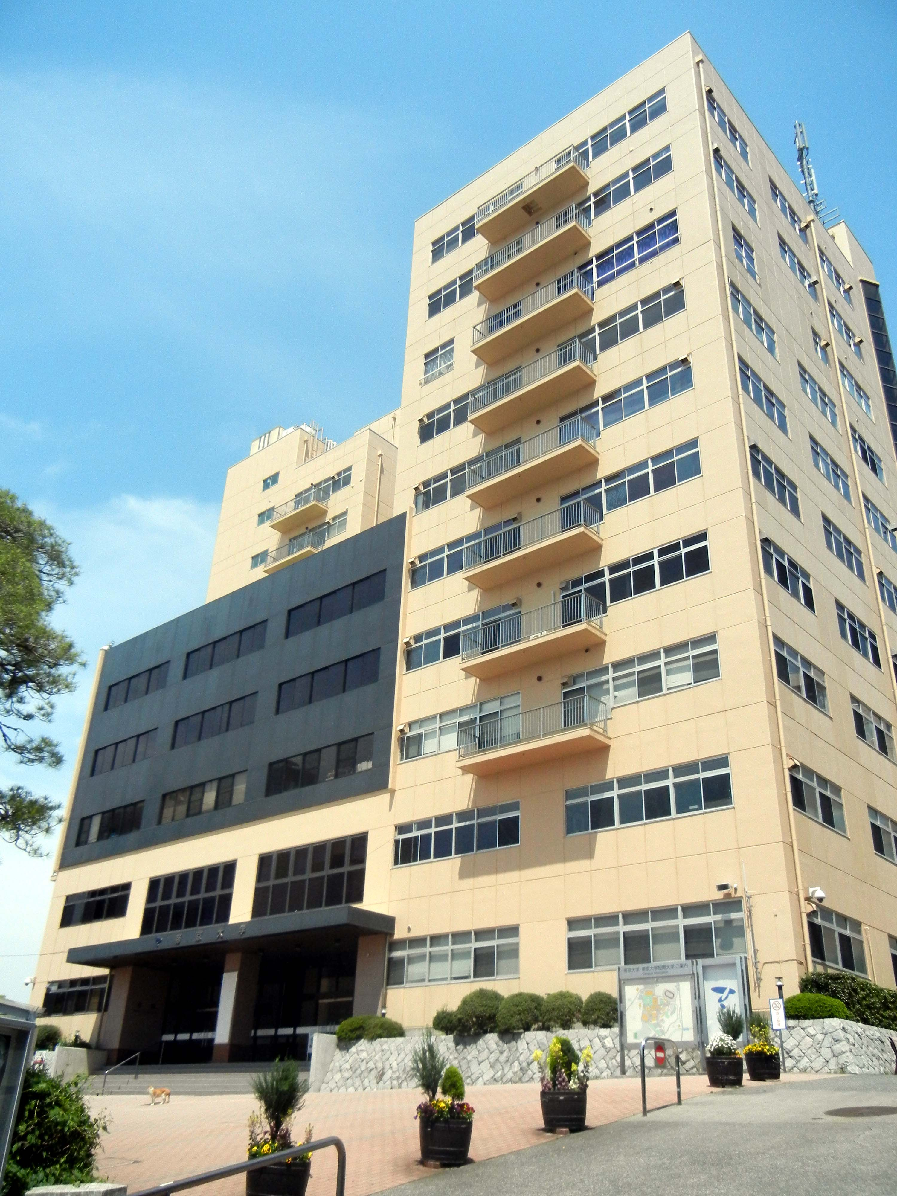 帝京大学八王子キャンパス本館